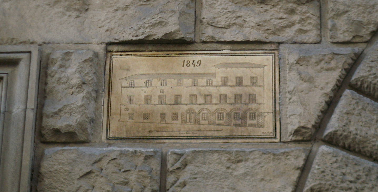 Palazzo malenchini-alberti, targa 1849